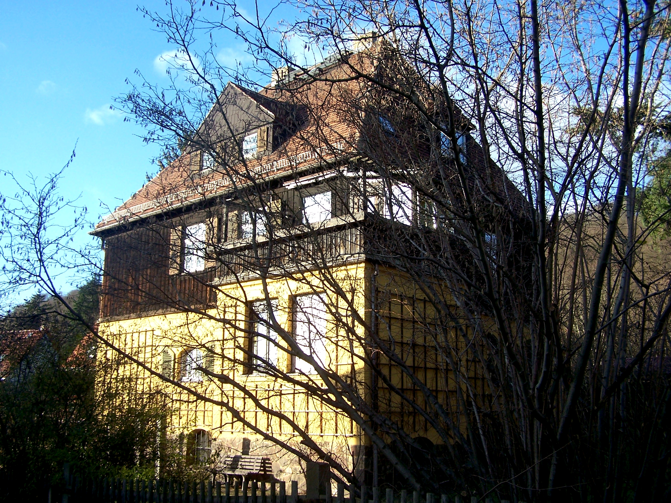 Landhaus von dem Bussche (Wettinstr. 22) in Radebeul